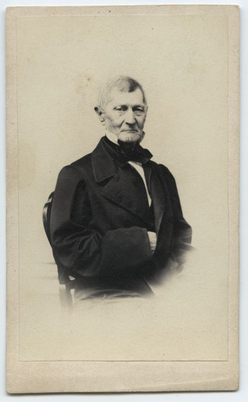 Georg Ignatius, Käina Martini koguduse õpetaja 1818–1864, Saarte-Lääne praostkonna praost 1861–1864